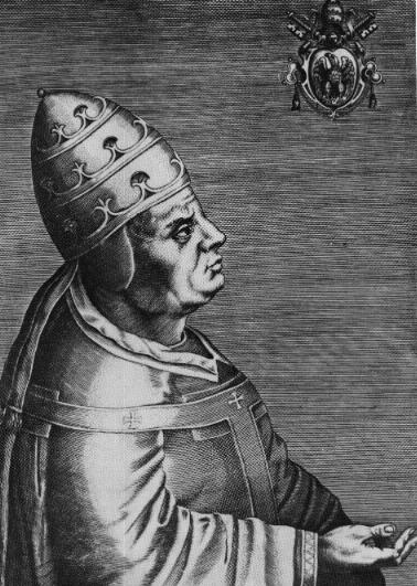 Urbanus VI, Pope. Grabado del Siglo XVII.